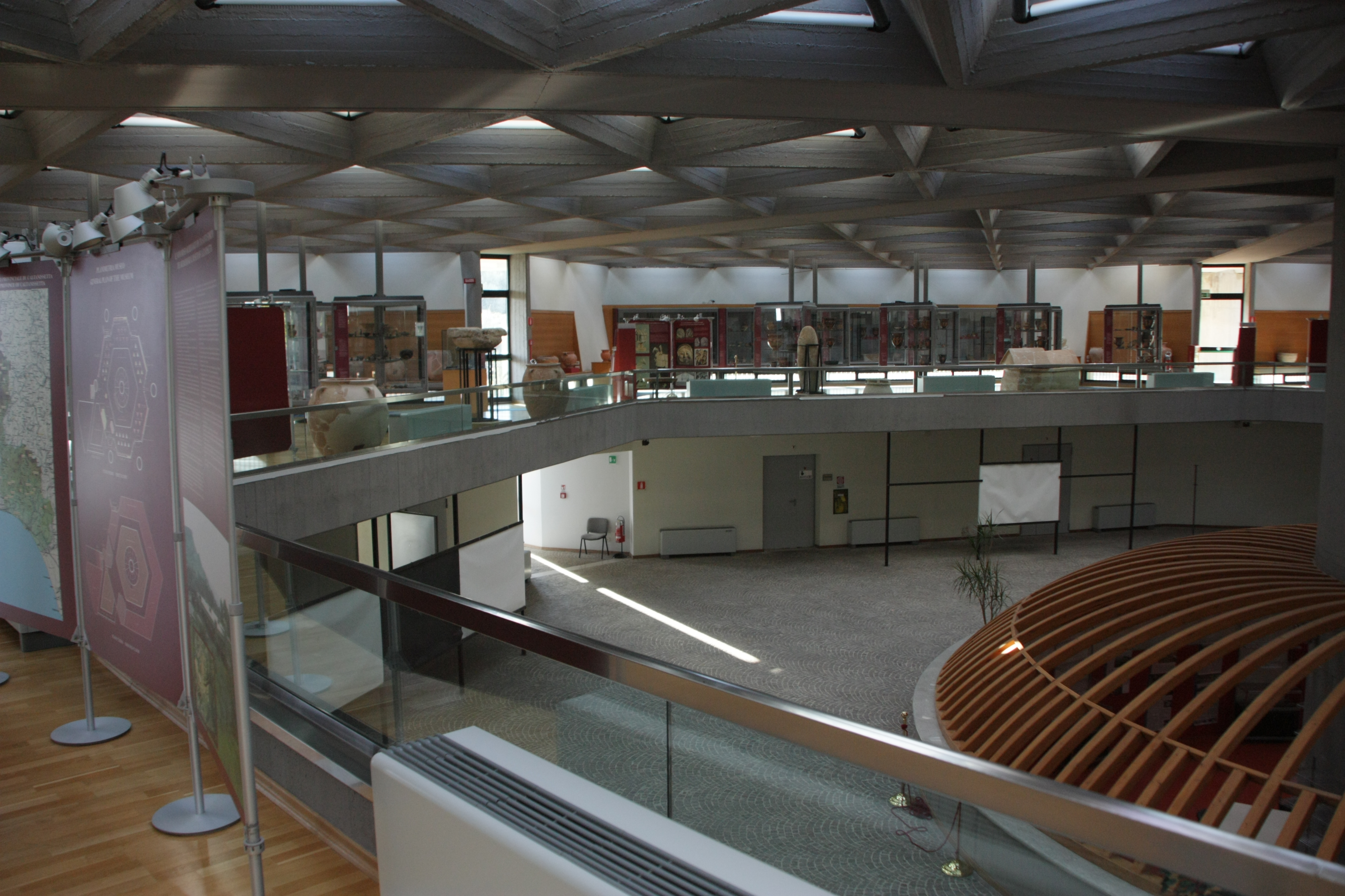 interno